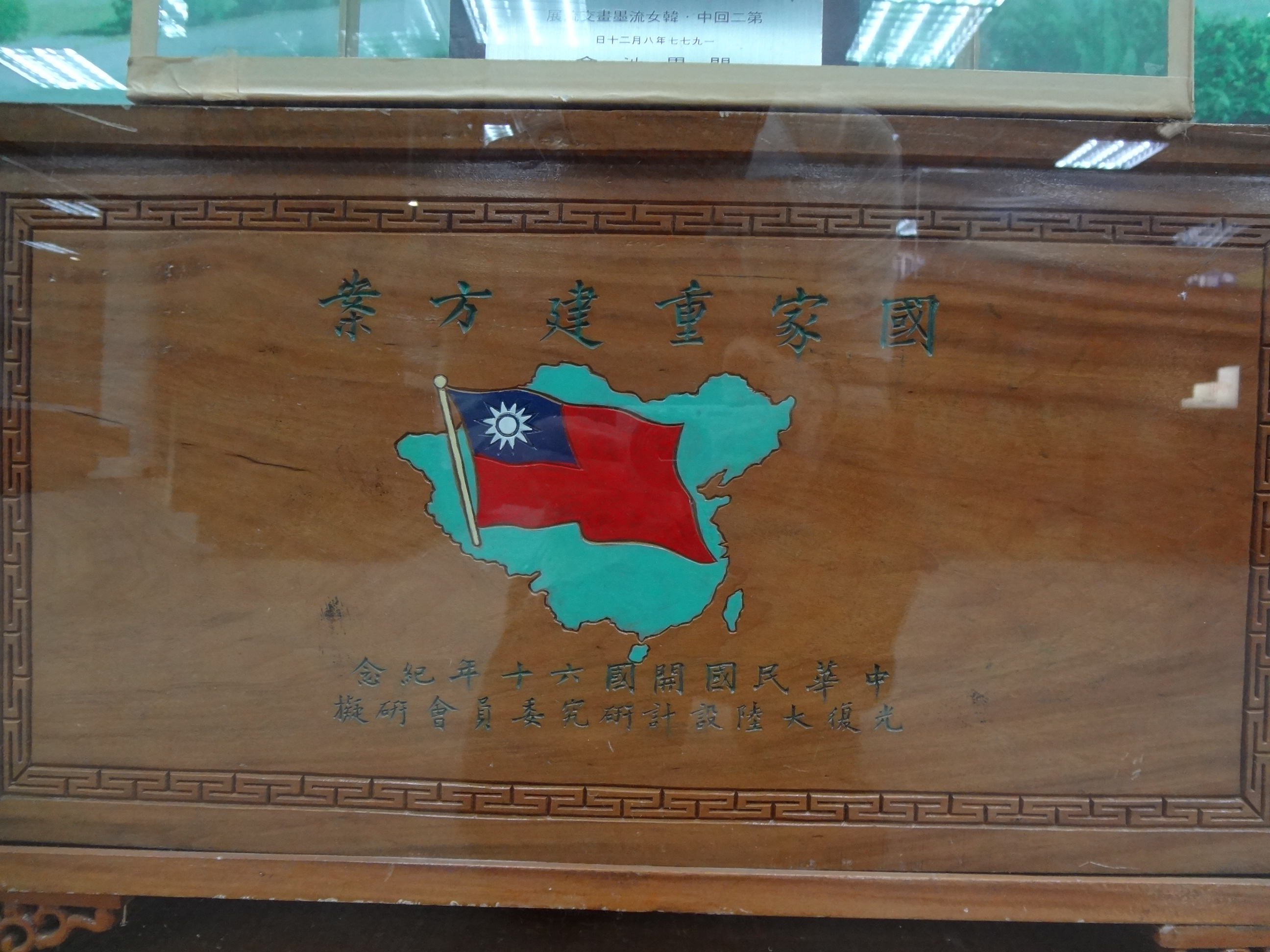 1971年，光復大陸設計研究委員會研擬的國家重建方案，中華民國開國60年紀念。現藏於臺北市國父紀念館館史室。